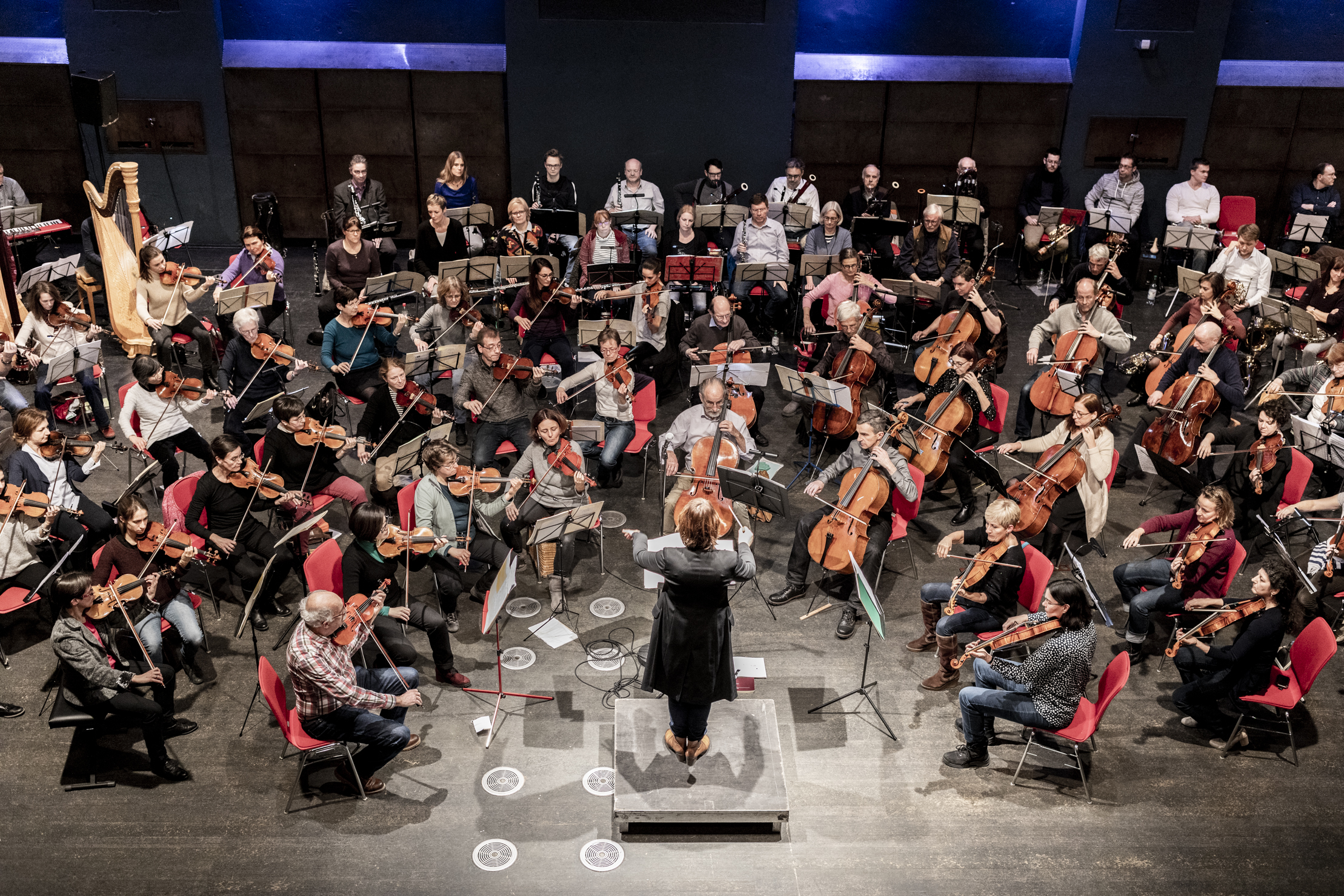 Konzert des Akademischen Sinfonieorchester München in der Münchner Muffathalle mit "Alpensinfonie". Werkstattkonzert für KulturRaum.